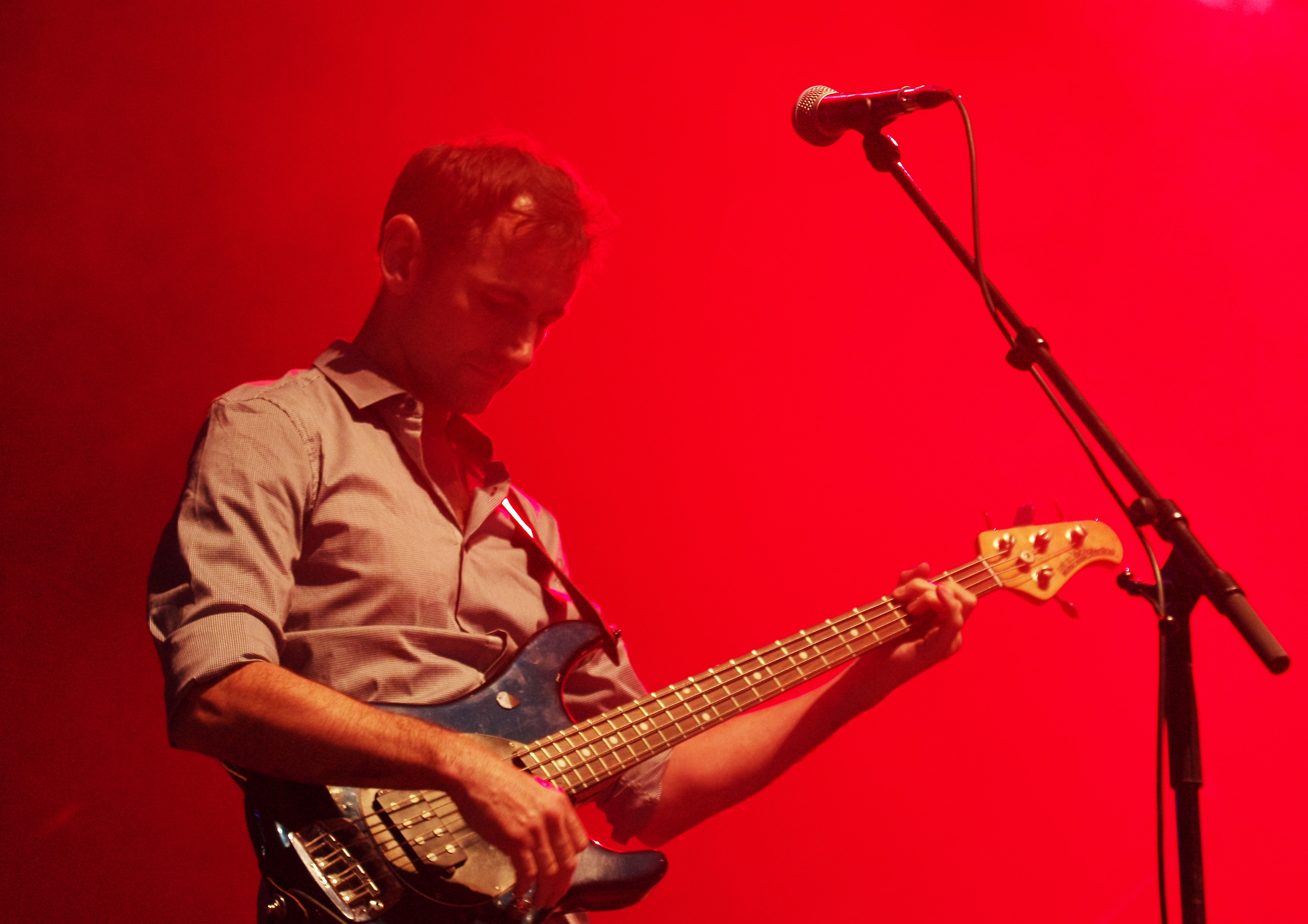 James (band) auf dem Haldern Pop Festival 2013. Hauptbühne. Besetzung: Tim Booth (Gesang) Jim Glennie (Bass) Larry Gott (Gitarre) Saul Davies (Gitarre, Violine, Percussion) Mark Hunter (Keyboards) Dave Baynton-Power (Schlagzeug) Andy Diagram (Trompete, Percussion)